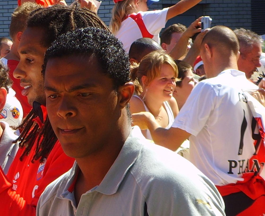 David Nascimento, Portuguese trainer